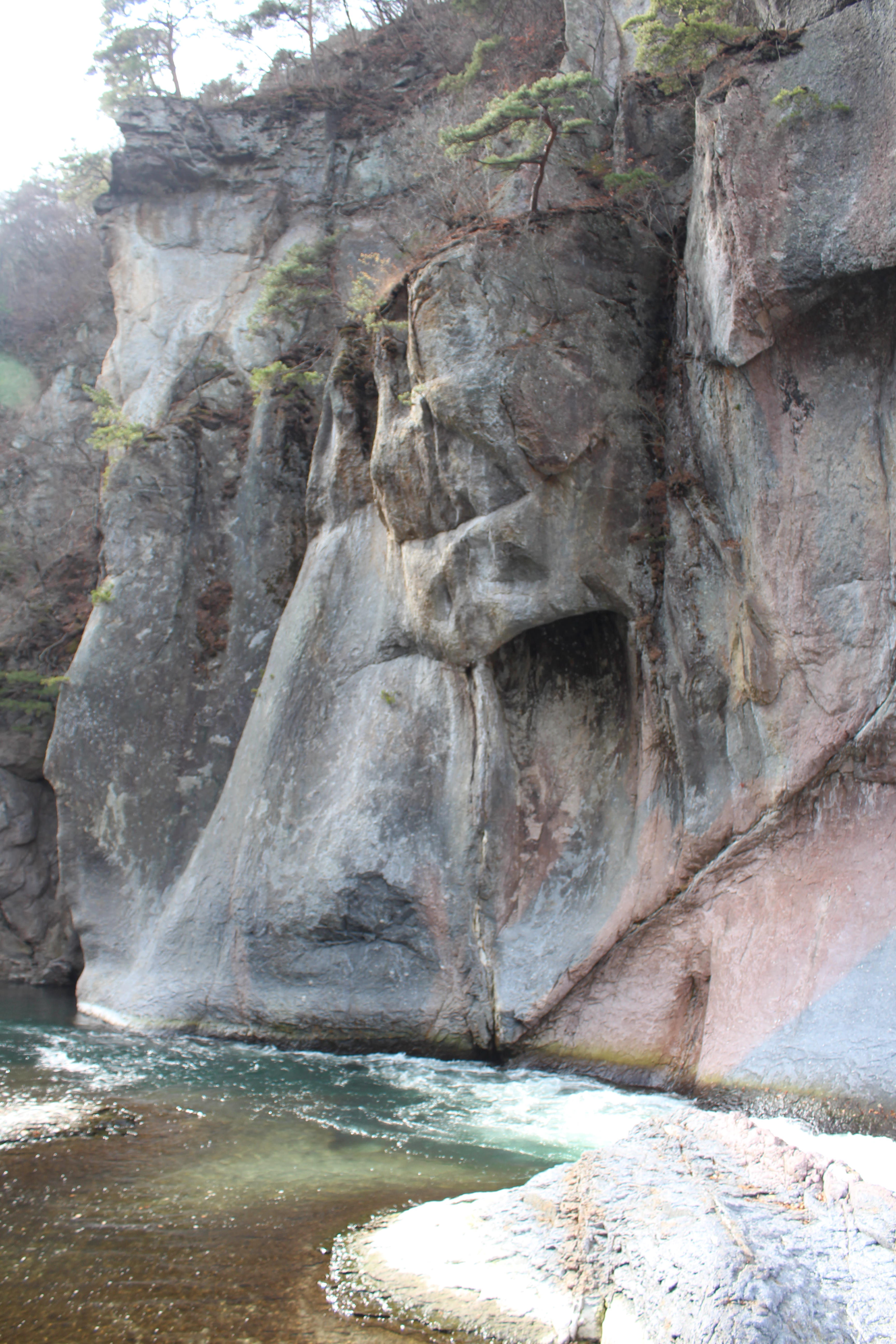 般若岩全体